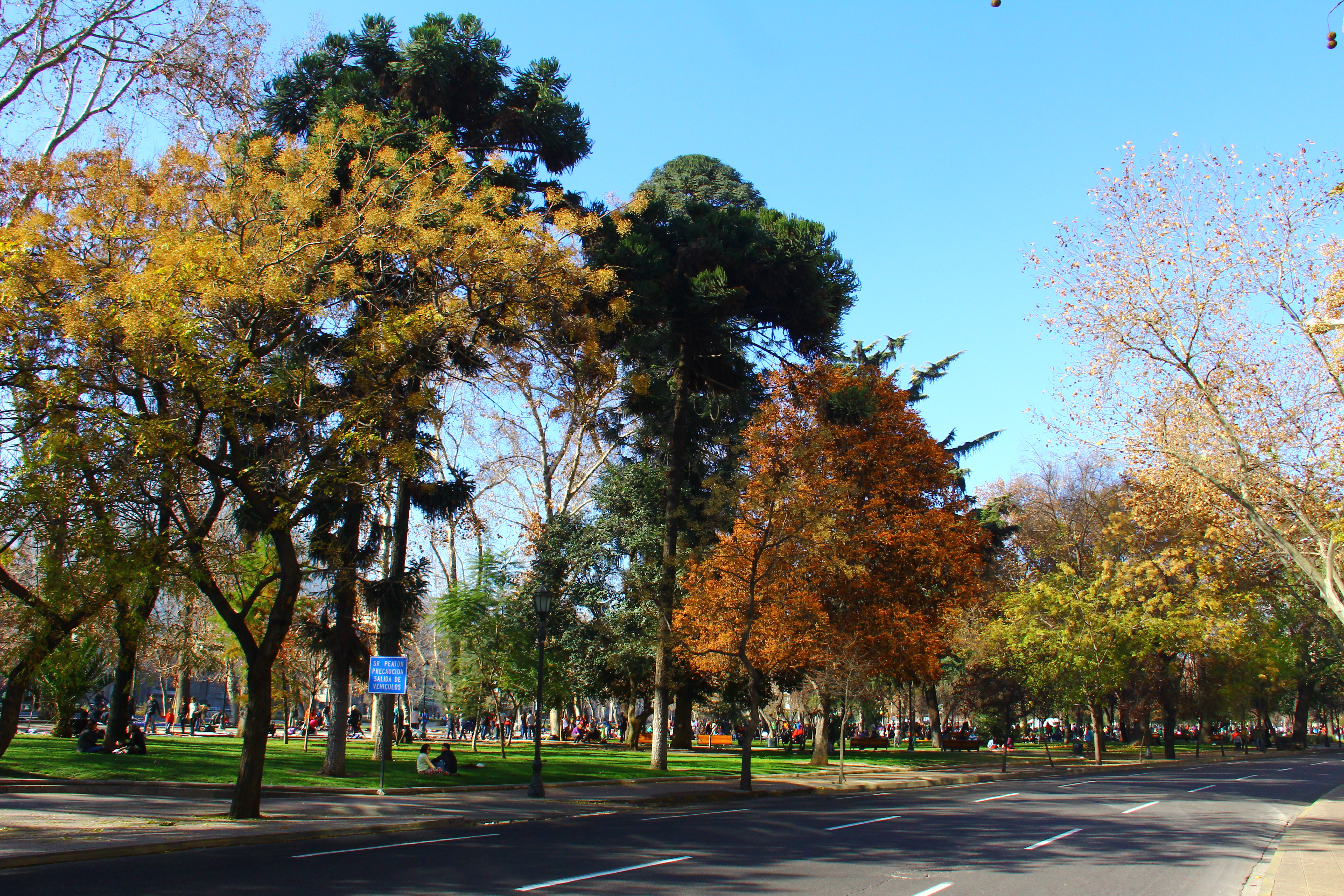 Parque Florestal - Santiago - Chile